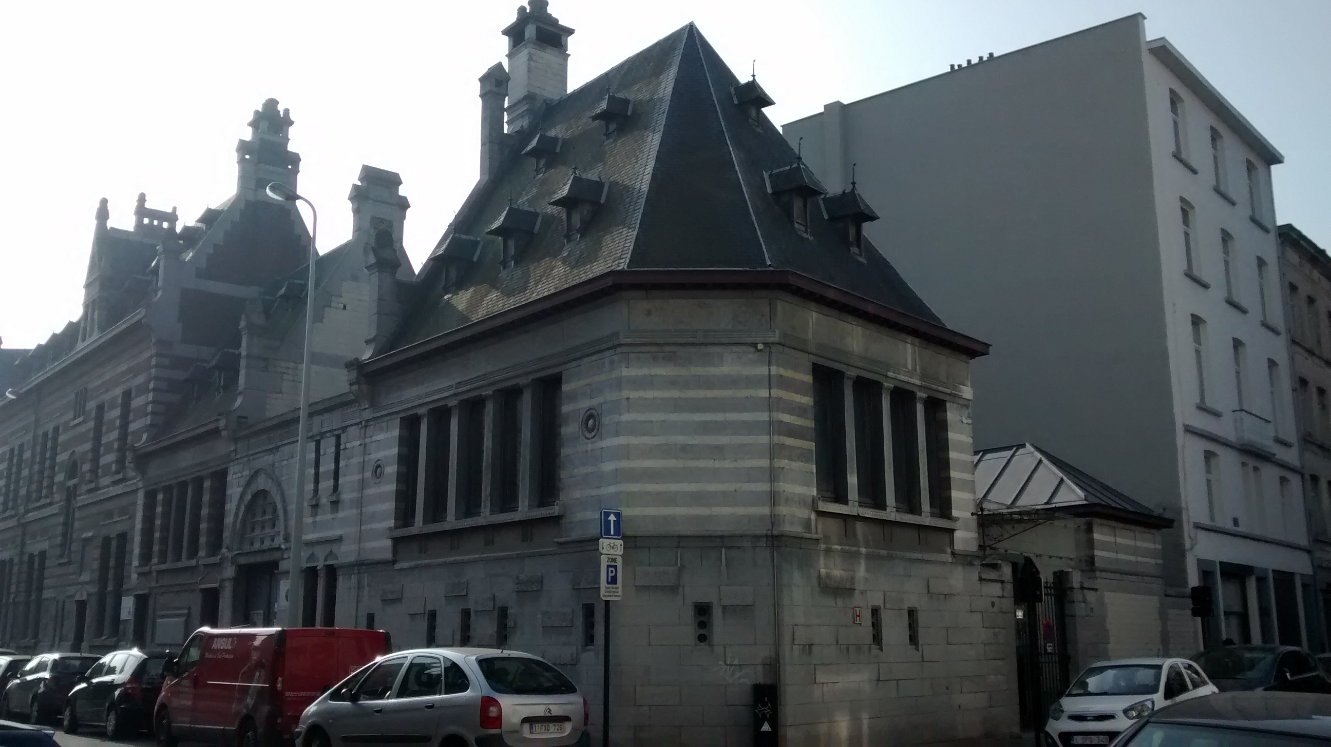 Voormalig dodenhuis en politiebureau van de Stad Brussel, hoek van de Oppemstraat en de Sint-Andriesstraat